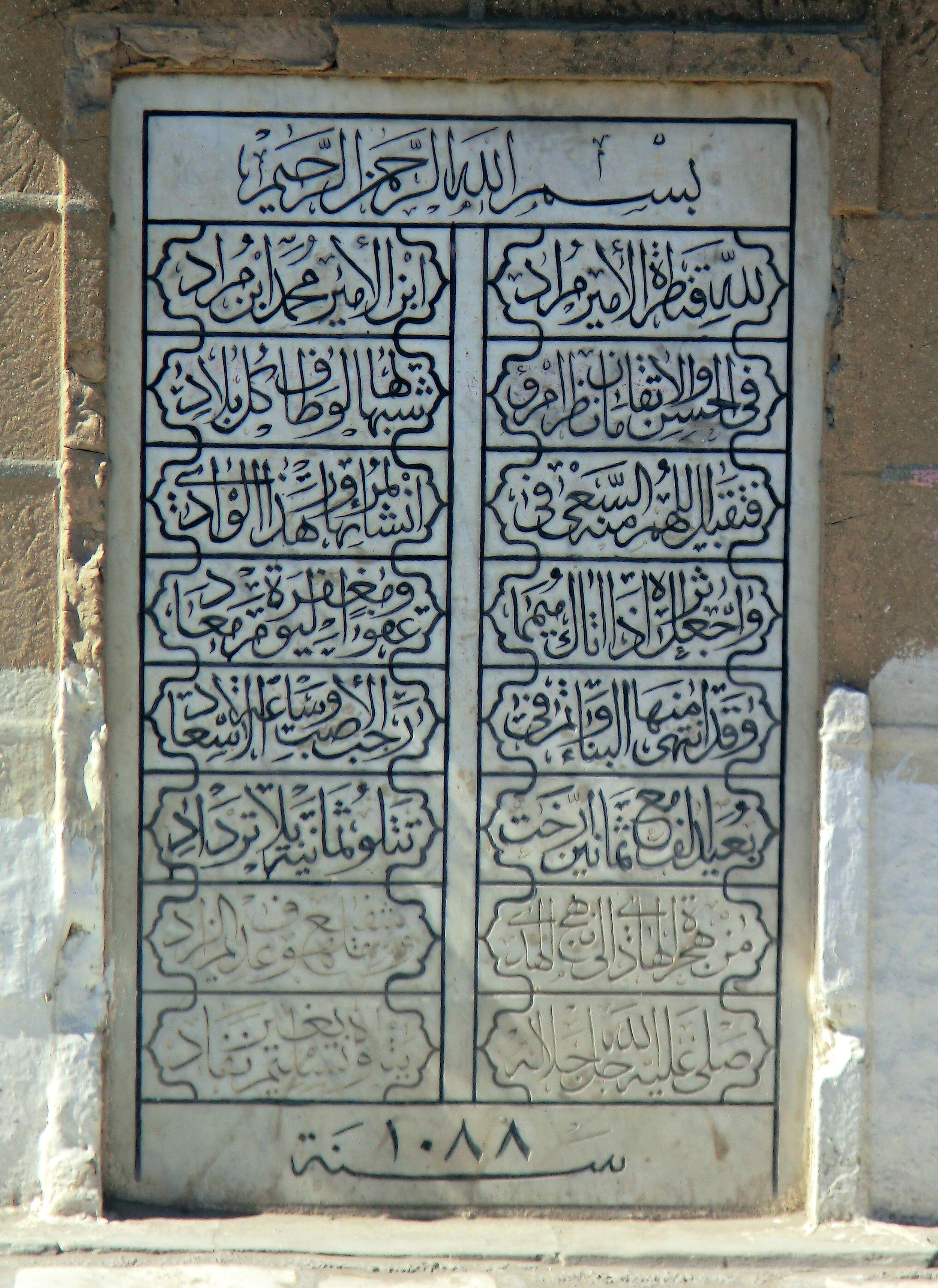 Mosquée, Medjez el-Bab